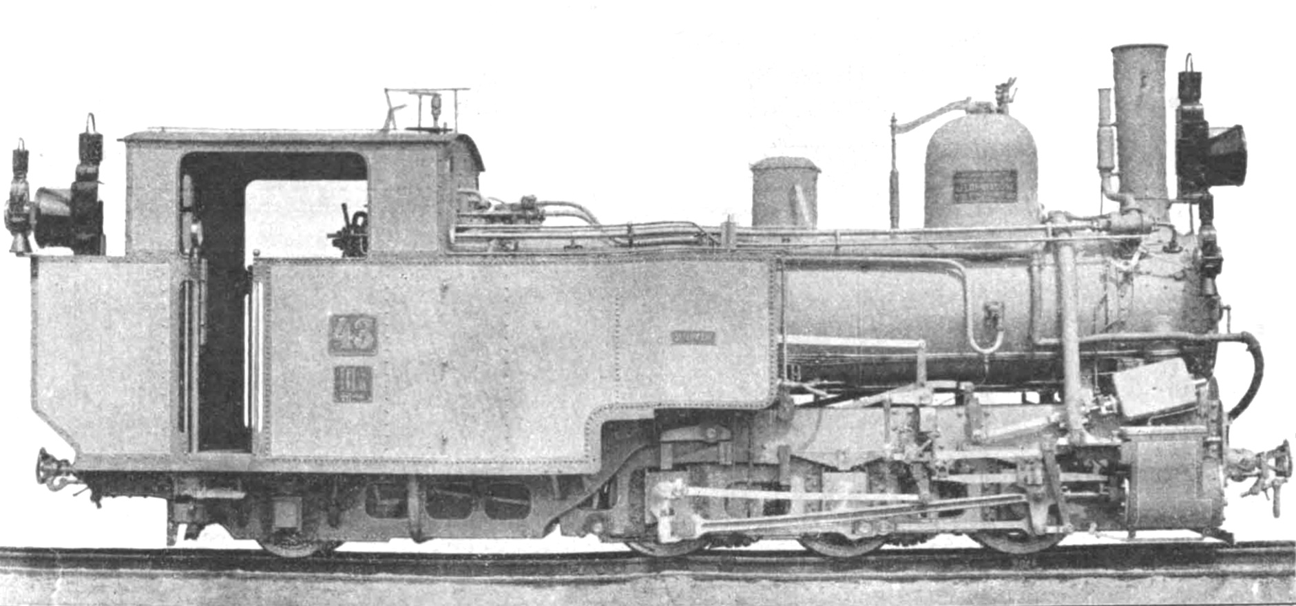 Stütztenderlokomotive Reihe IIIb4 Nr.43 mit Zahnrad- und Adhäsionsantrieb der Bosnisch-Herzegowinischen Staatsbahnen (BHStB), Werkbild